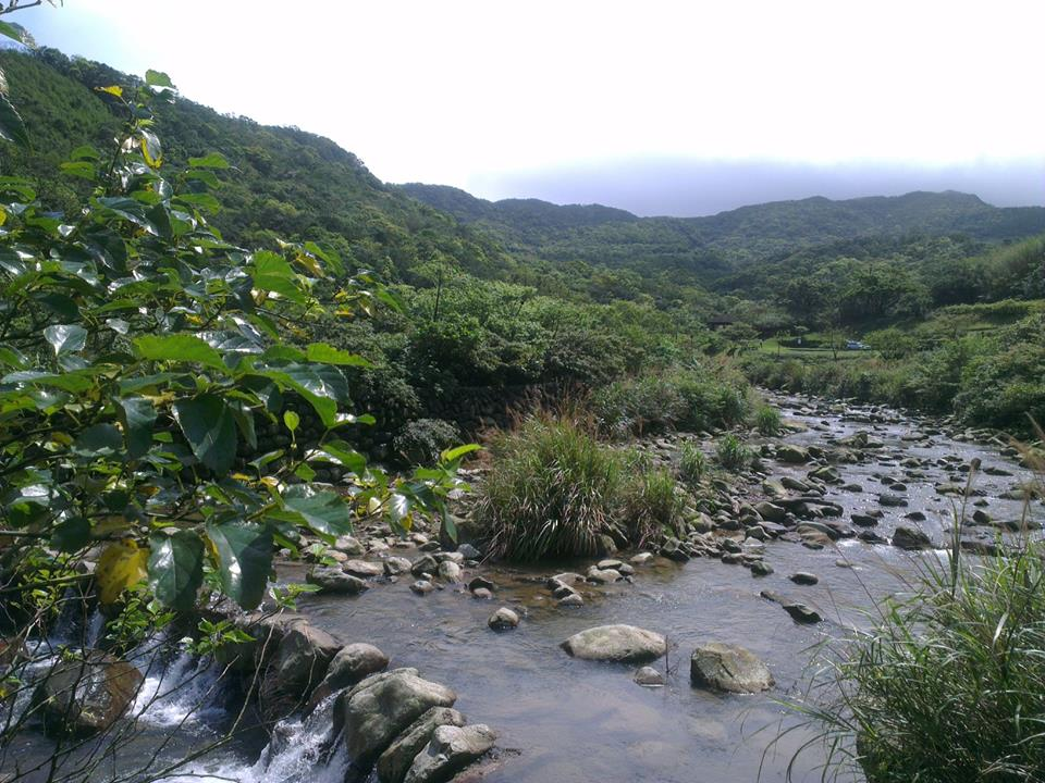 草嶺古道前段騎單車路線的風景。